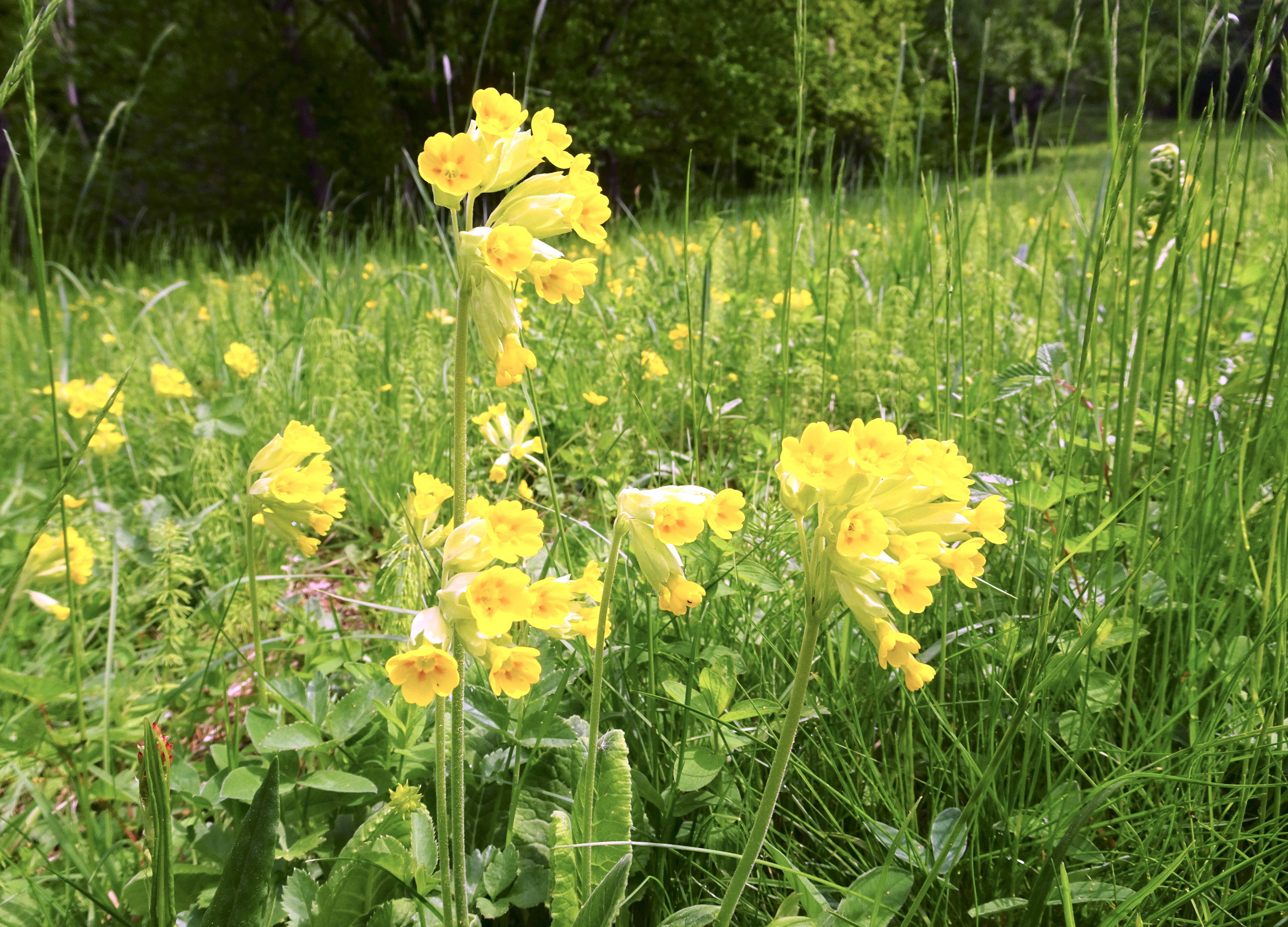 Gullvivor blommar på Gömsta äng naturreservat